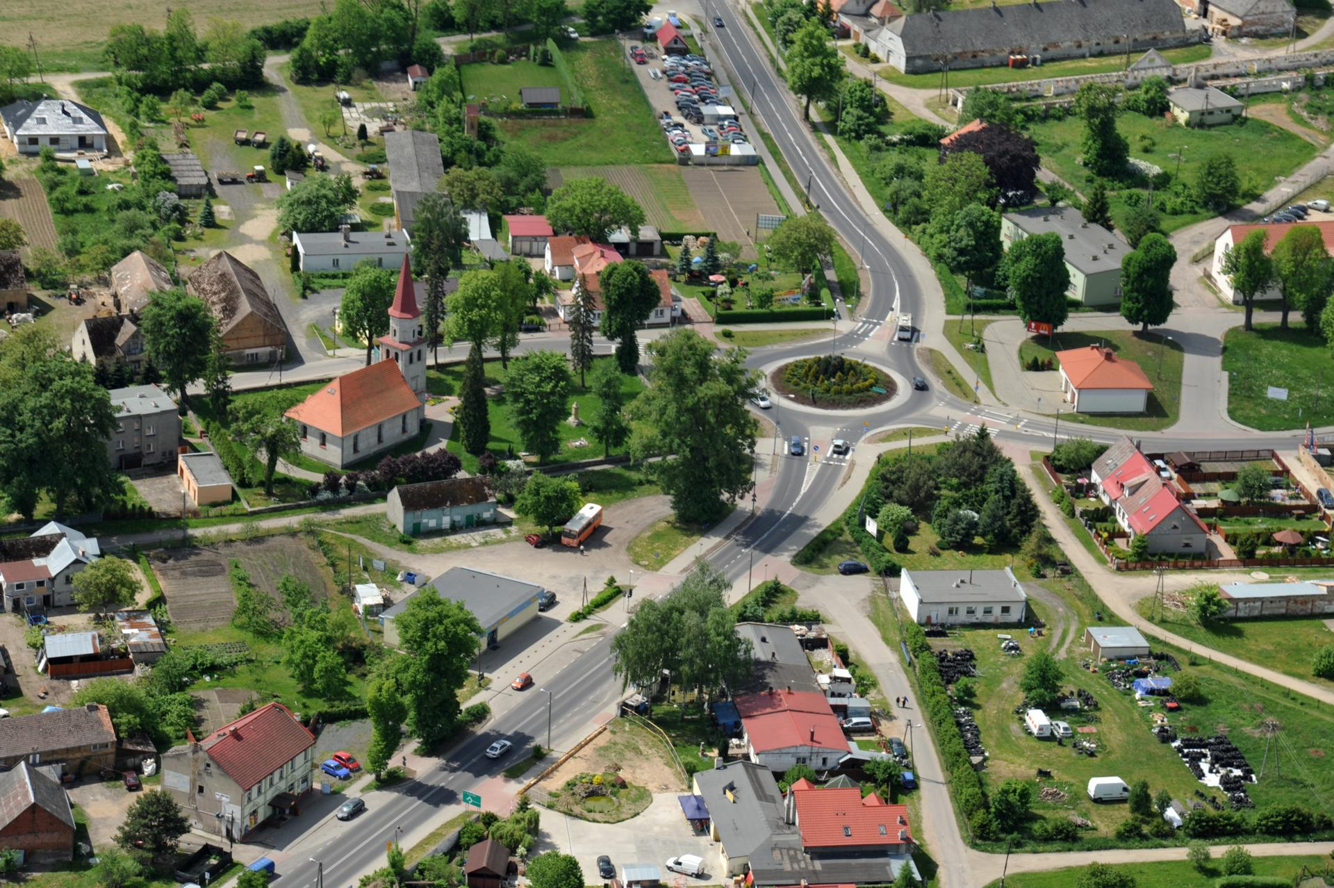 Zabudowa centrum Różanek